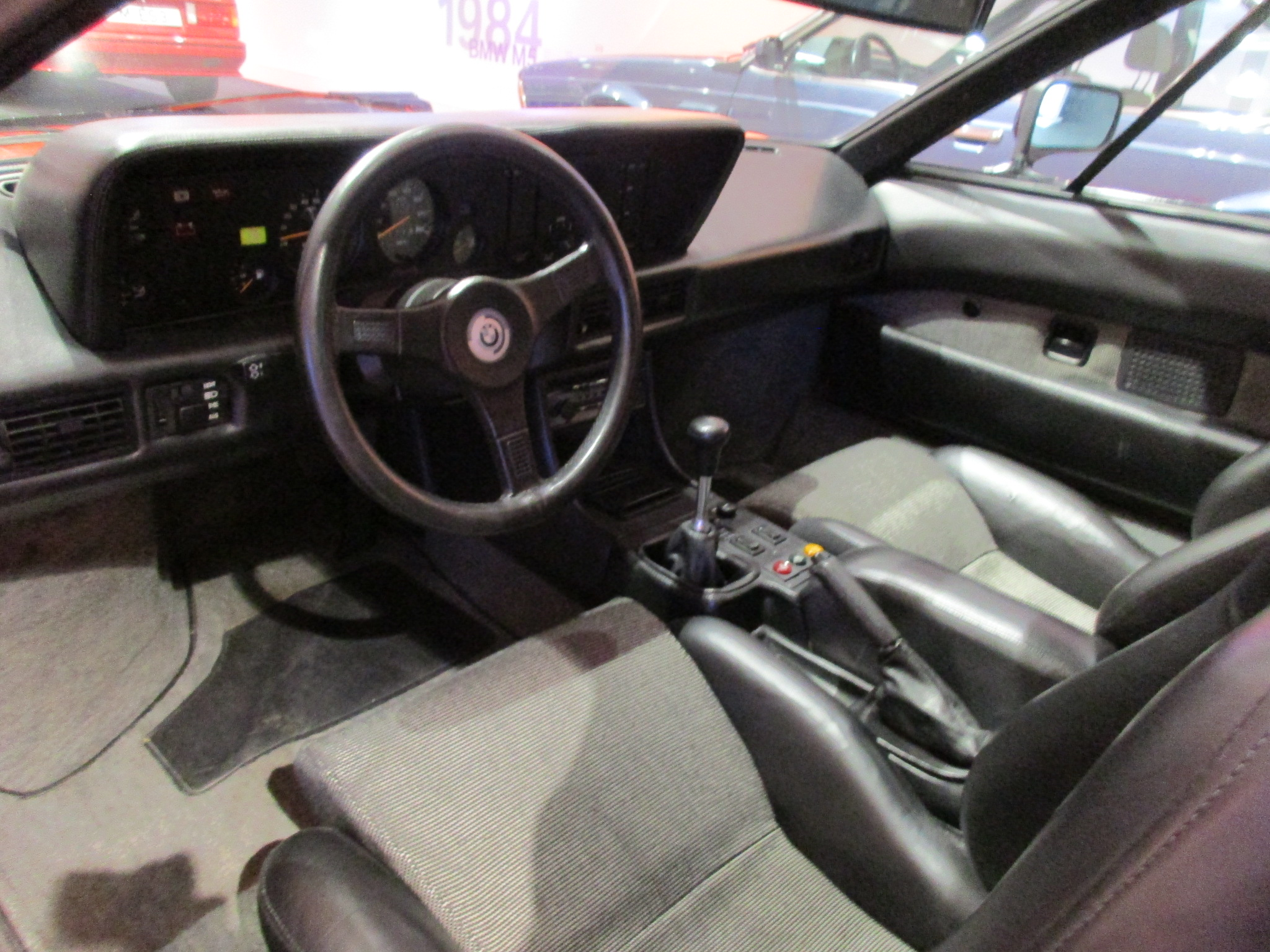 BMW M1 in the BMW-Museum